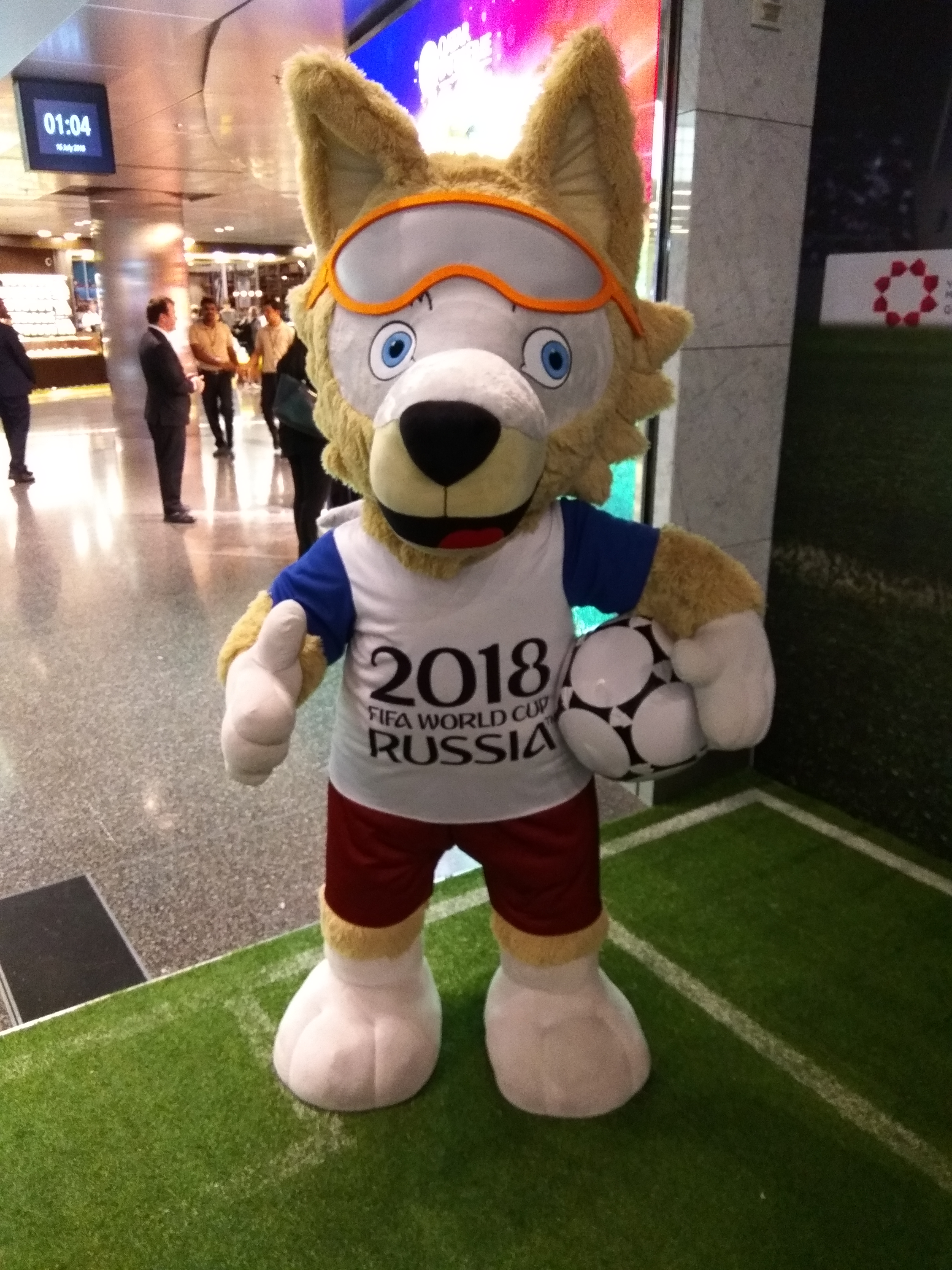 Забивака в аеропорту м. Дохи (Катар)